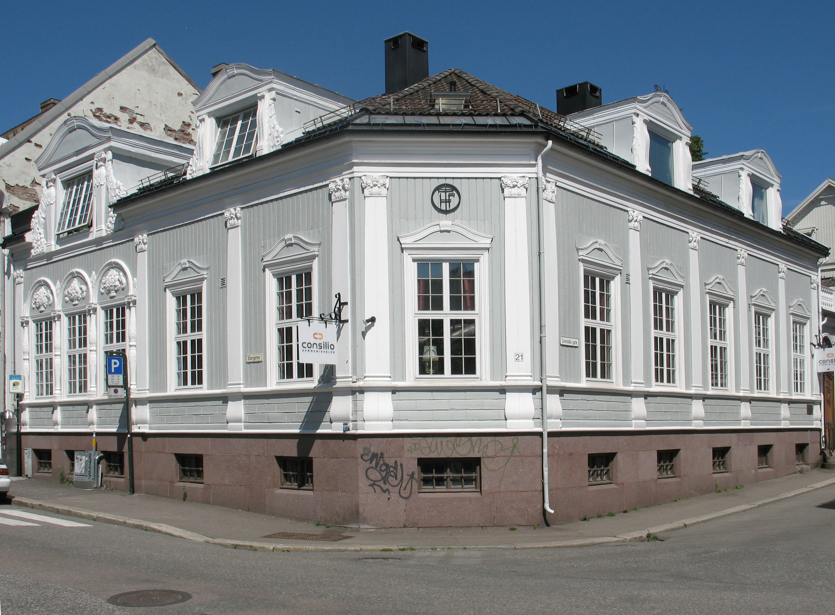 Conradigården i Tønsberg.